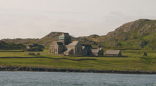 Abbey auf der Insel Iona